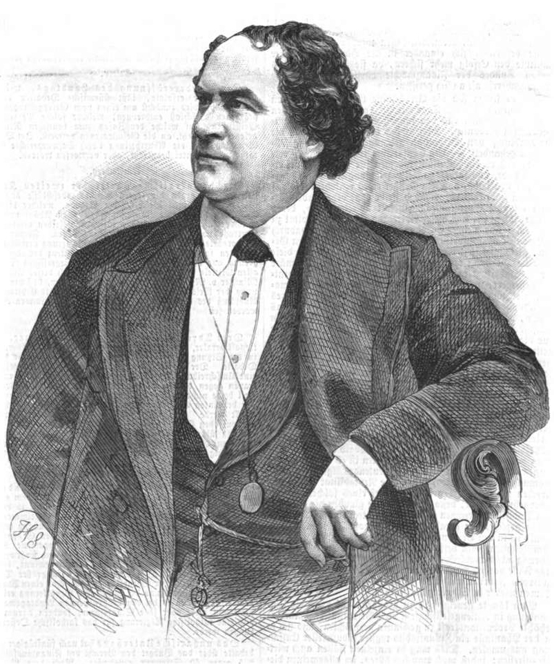 Hermann Hendrichs, deutscher Schauspieler im 19. Jh.